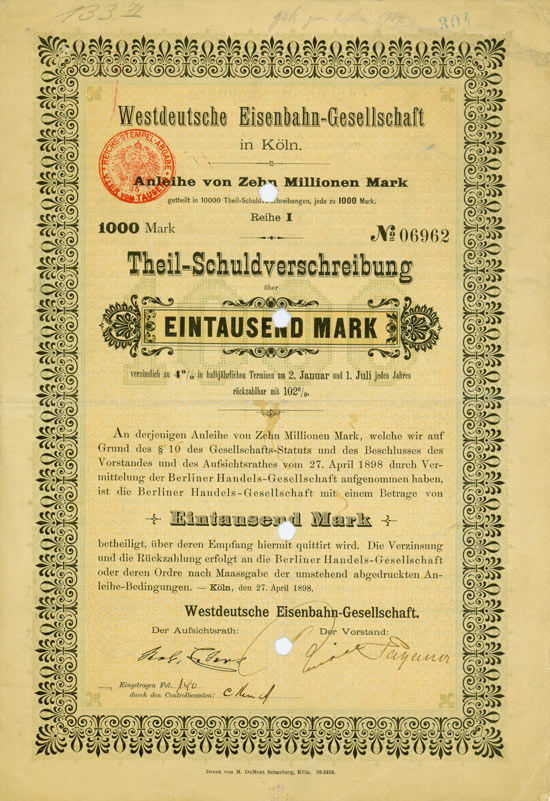 Teilschuldverschreigung über 1000 Mark der Westdeutschen Eisenbahn-Gesellschaft vom 27. April 1898